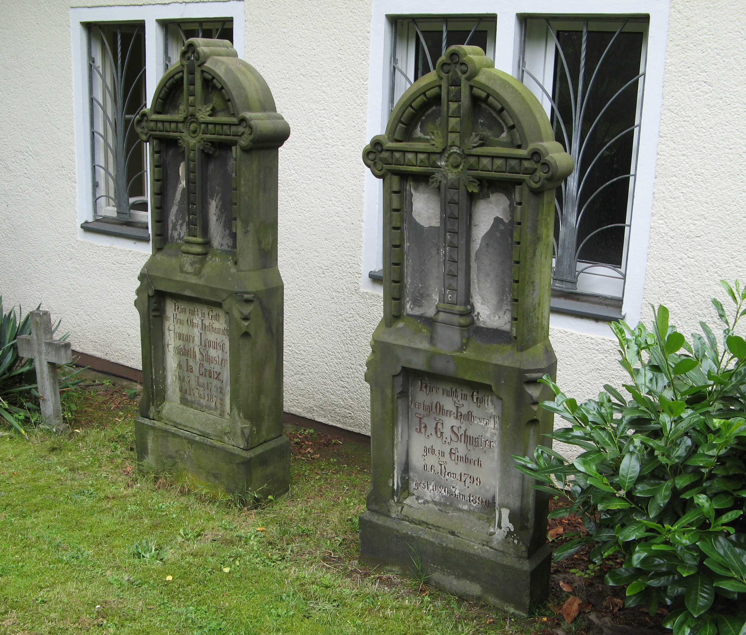 Grabmale vom kgl. Ober-Hofbaurat H. G. Schuster (rechts) und Eleonore Louise Elisabeth Schuster geb. la Croix (links)